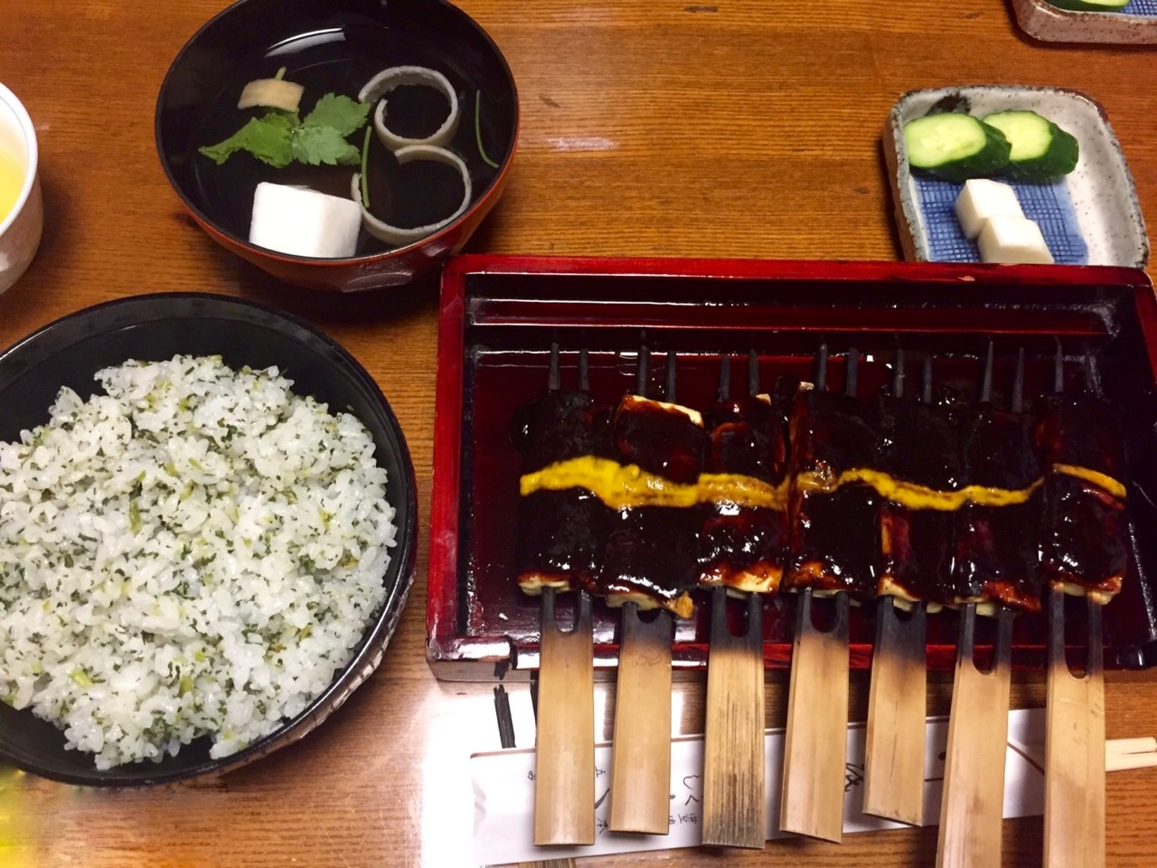 愛知県豊橋市の「きく宗」で提供される菜飯田楽。田楽が置かれている漆器は伊勢春慶。